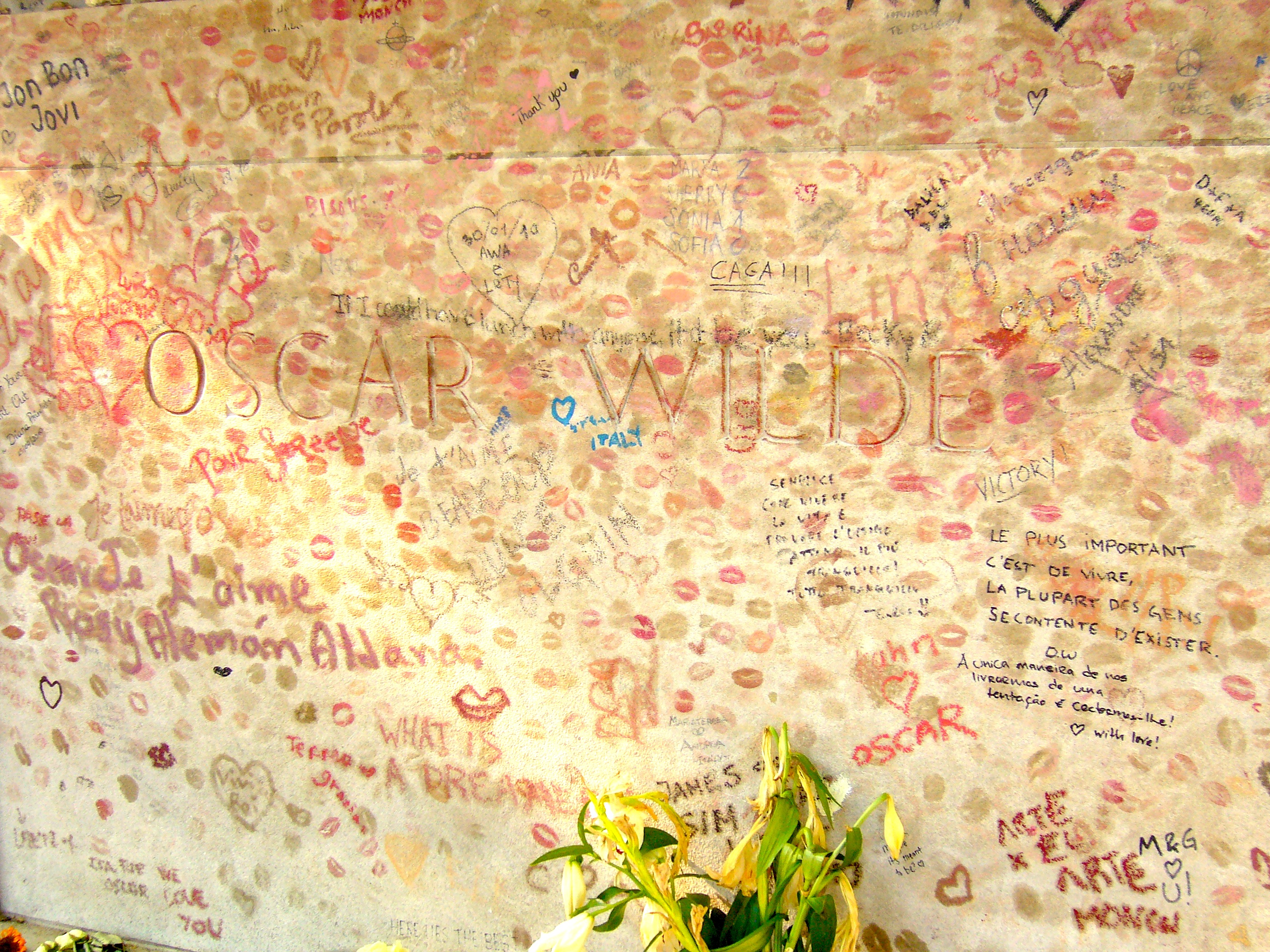 Monument funéraire d'Oscar Wilde représentant un sphinx dans le cimetière du Père-Lachaise à Paris (20ème arrondissement)